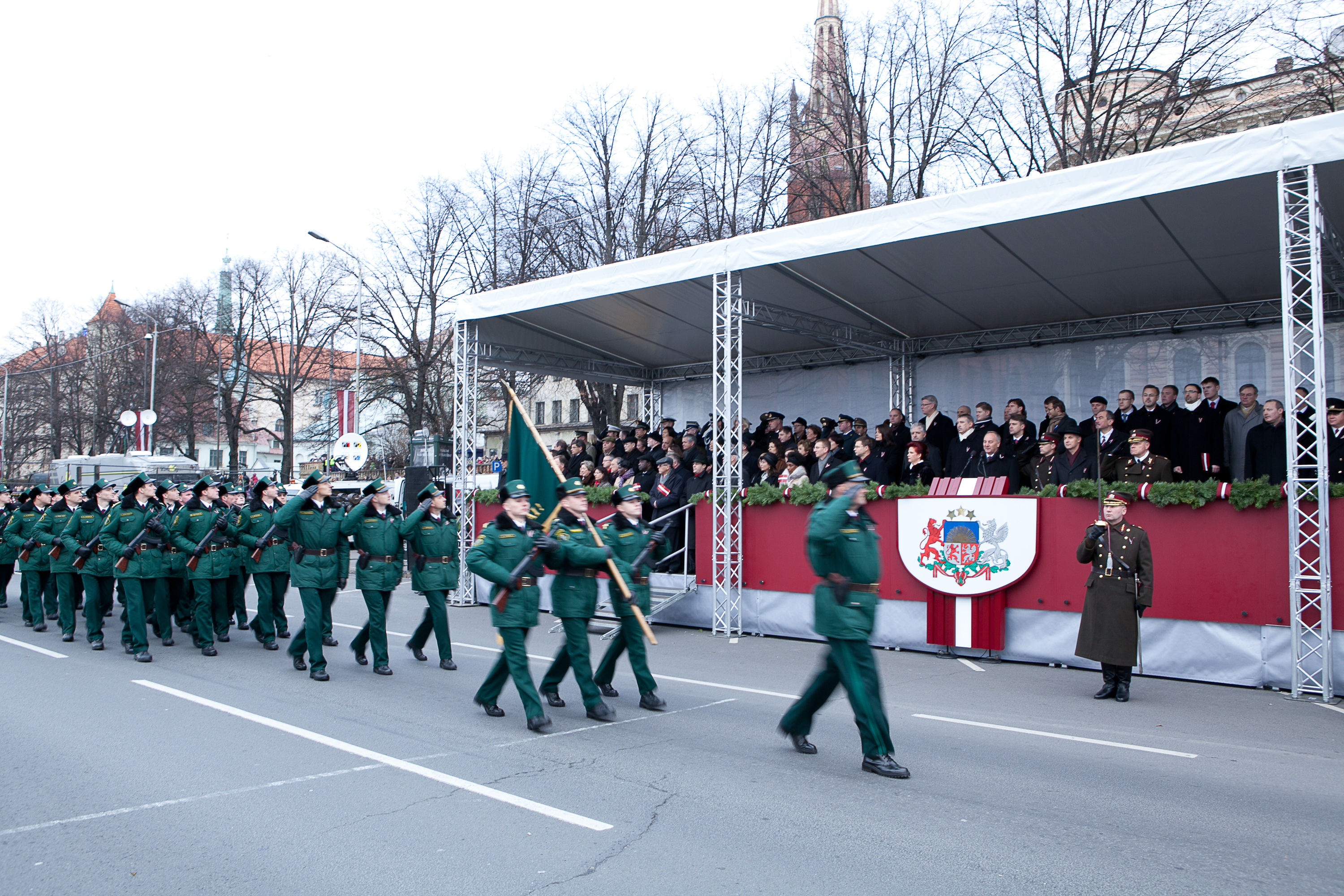 2011.gada 18.novembris. 11.novembra krastmalā notiek svinīgā Nacionālo Bruņoto spēku parāde. Foto: Ernests Dinka, Saeimas Kanceleja